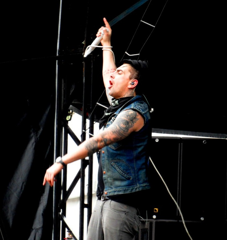 Ian Watkins en 2010.